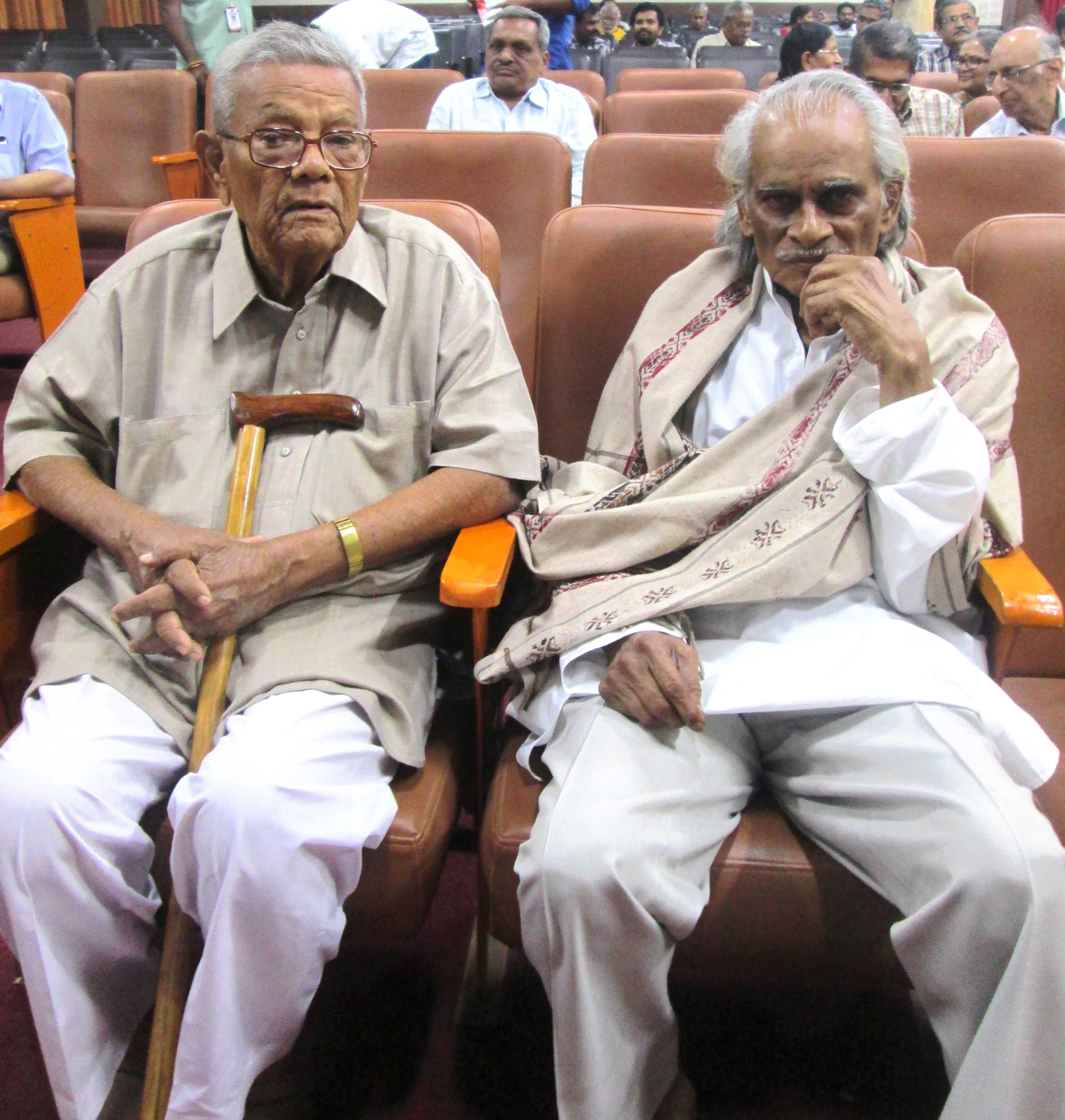 కాళీపట్నం రామారావు